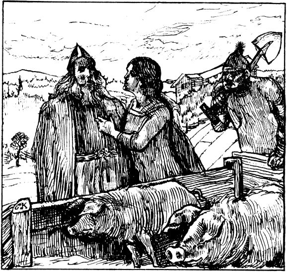 Christian Krogh: Illustration for Olav Tryggvasons saga, Heimskringla 1899-edition. nn: «Tora fører Håkon jarl til grisebingen.» nb: «Tora fører Håkon jarl til grisebingen.»